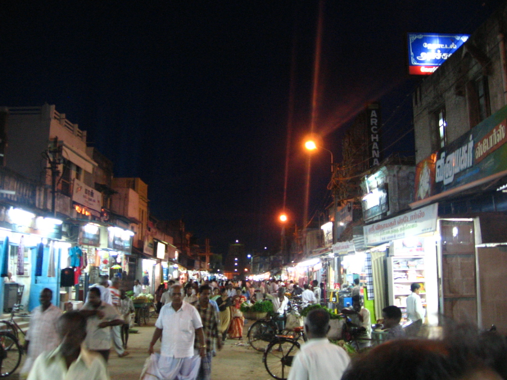 Taken at market near Ramaswamy Temple, Kumbakonam at night